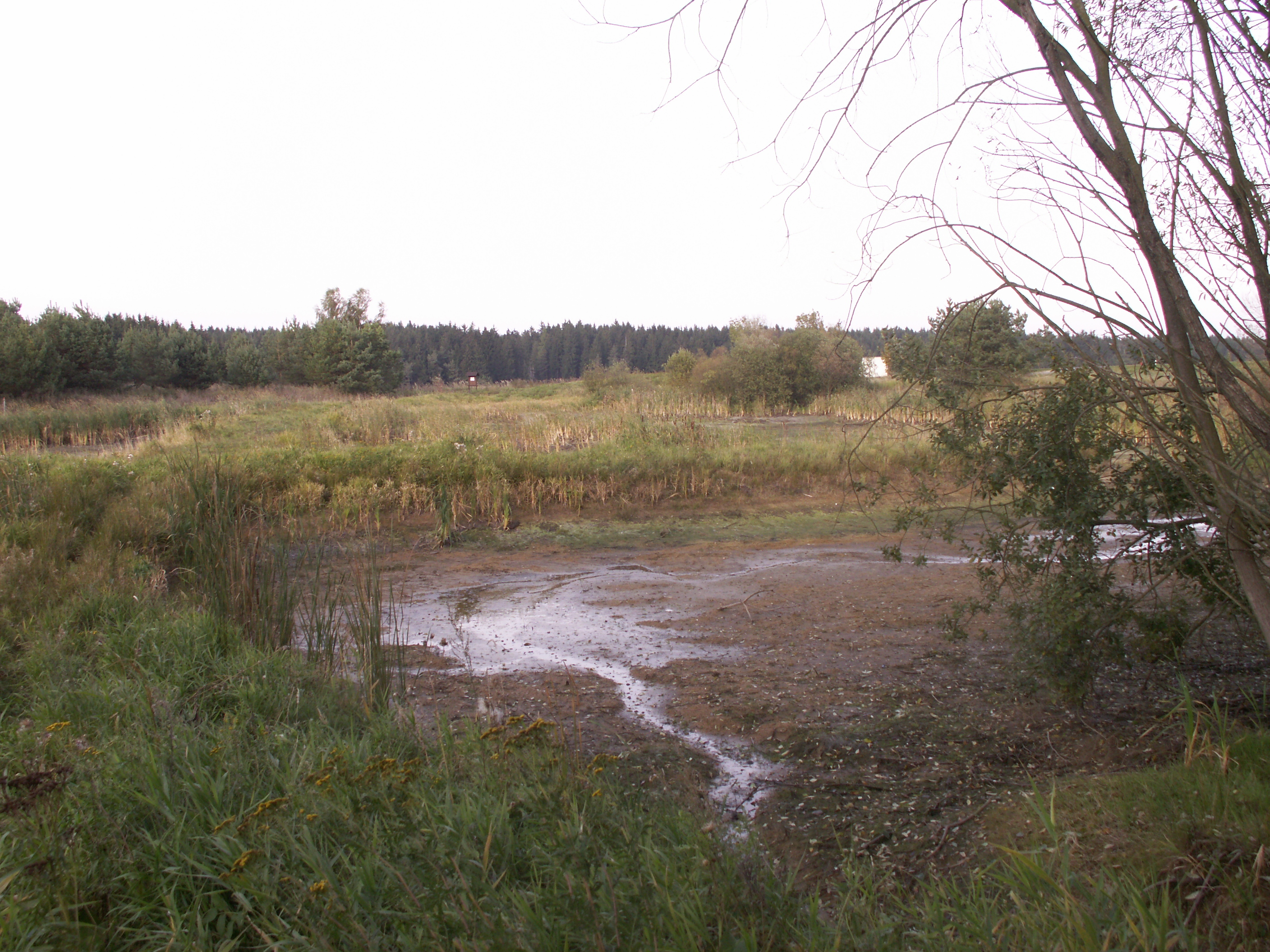 přírodní památka č. 13475 Laguna u Bohdalova, okres Žďár nad Sázavou